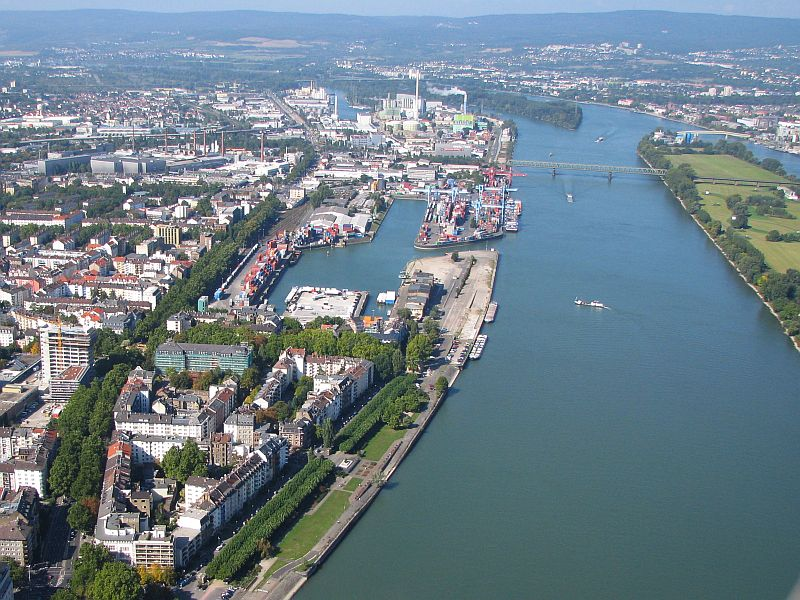 Mainz Luftbild Industrie Wirtschaft Mainz-Neustadt Mombach Zollhafen Industriehafen Binnenhafen Rhein Foto 2008 Wolfgang Pehlemann Wiesbaden IMG_0103